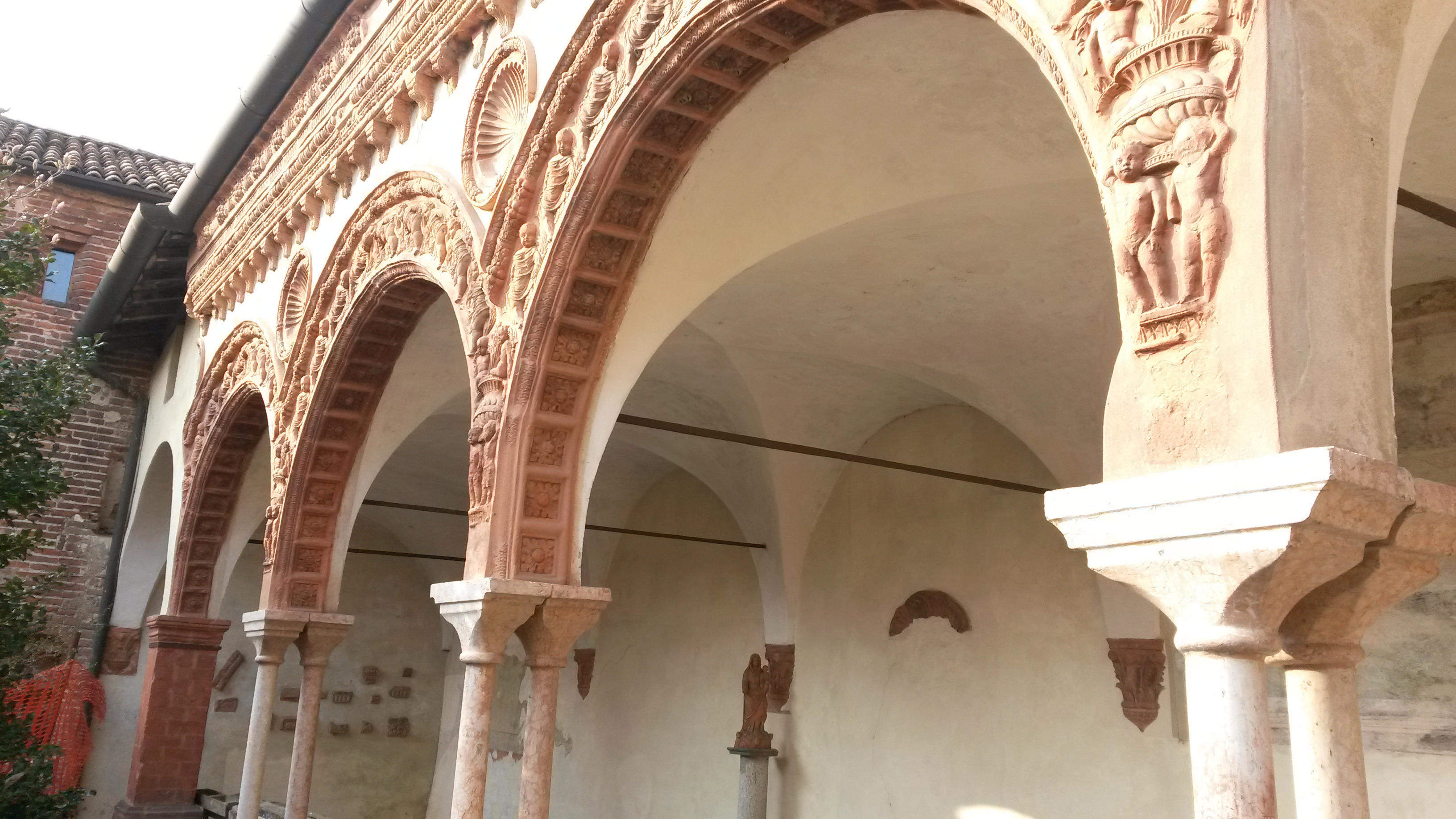 Monastero romanico di San Lanfranco (Pavia), chiostro rinascimentale con rilievi in cotto dello scultore lombardo Giovanni Antonio Amadeo